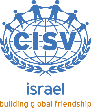 לוגו CISV ישראל, פרוטרט